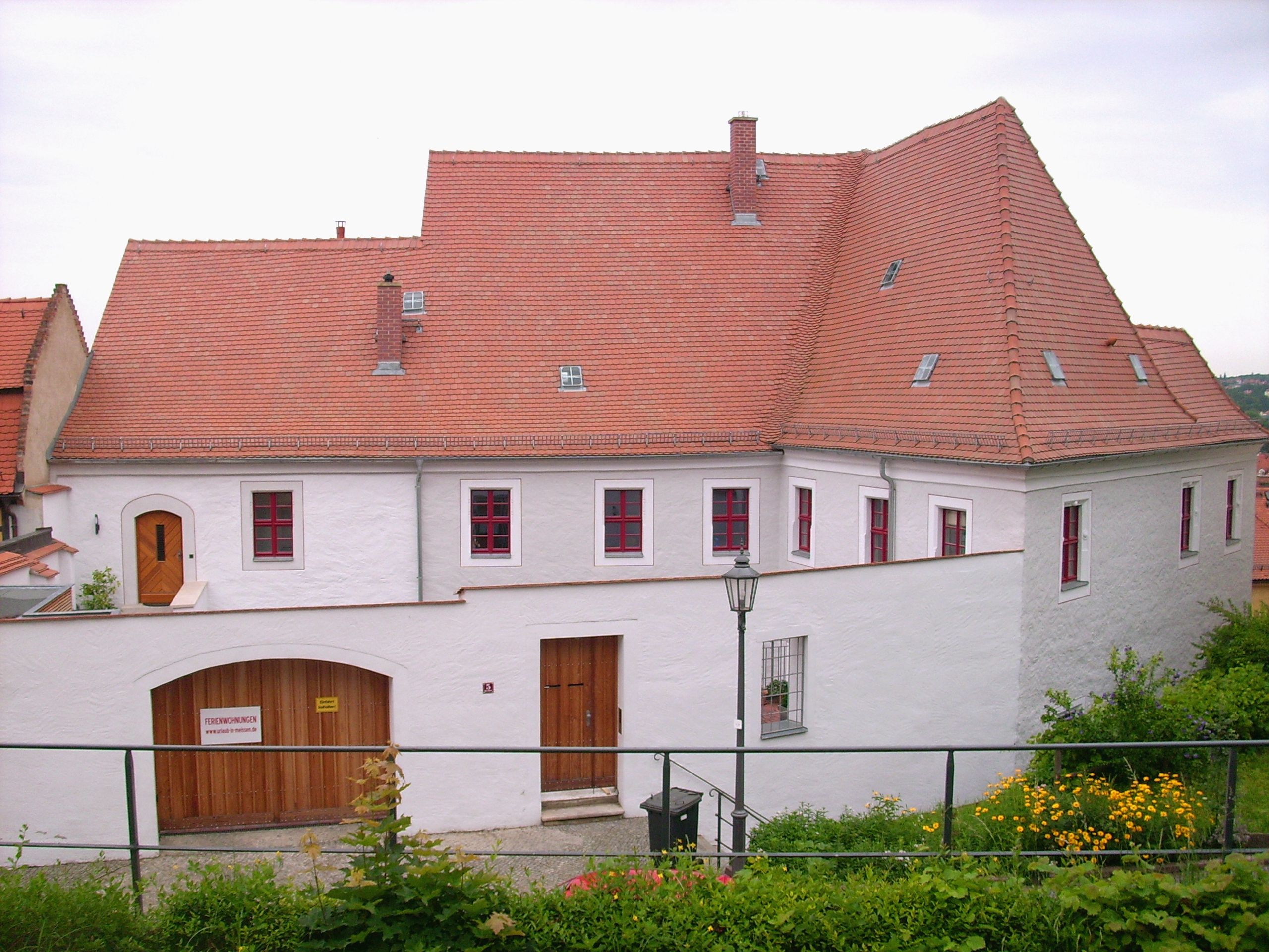 Wohnhaus, Freiheit 5 in Meißen